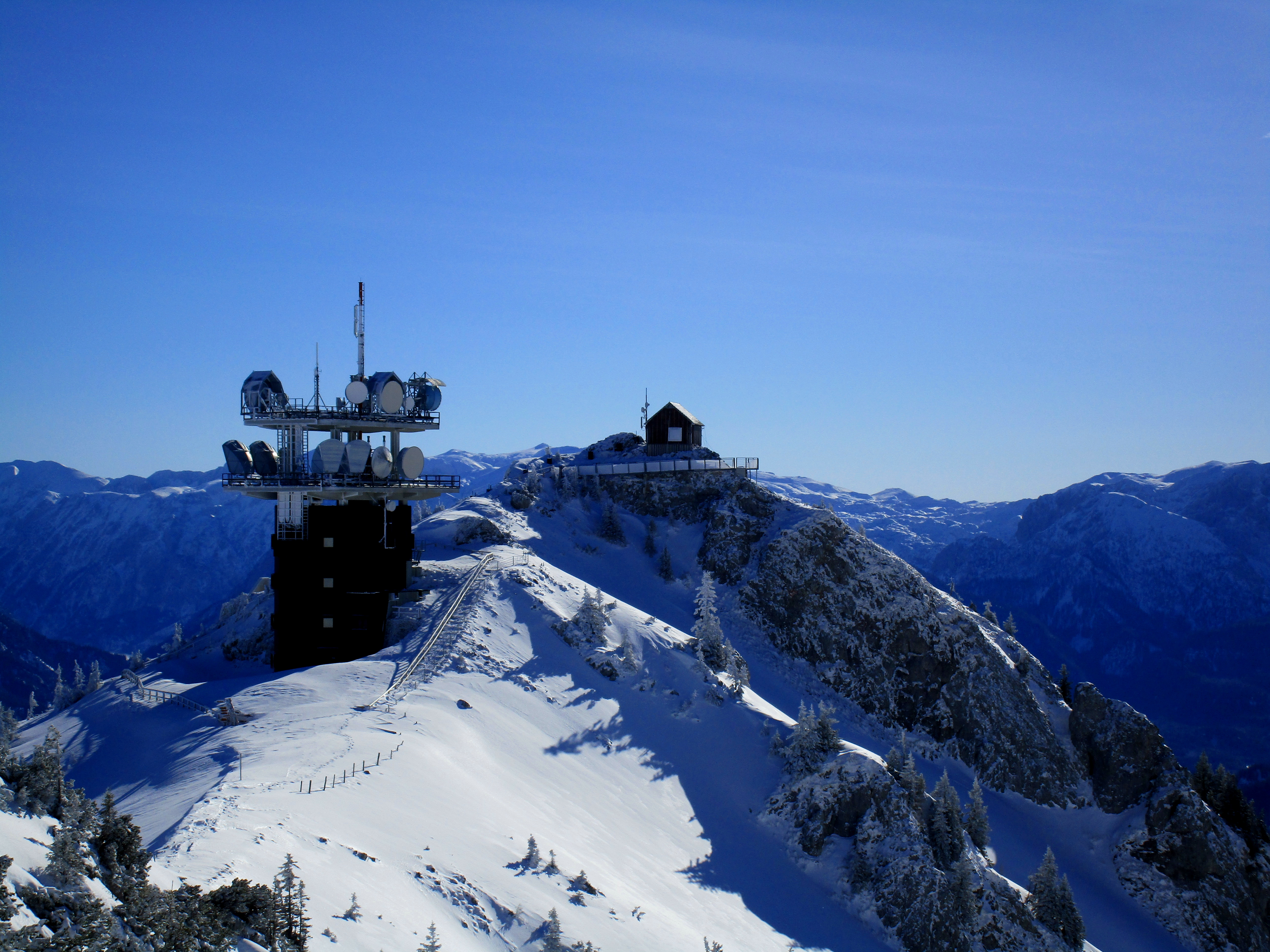 Der Funkturm der Telekom Austria am Hochkar im Februar 2016